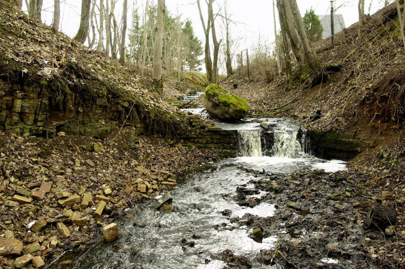 Orasoja juga.